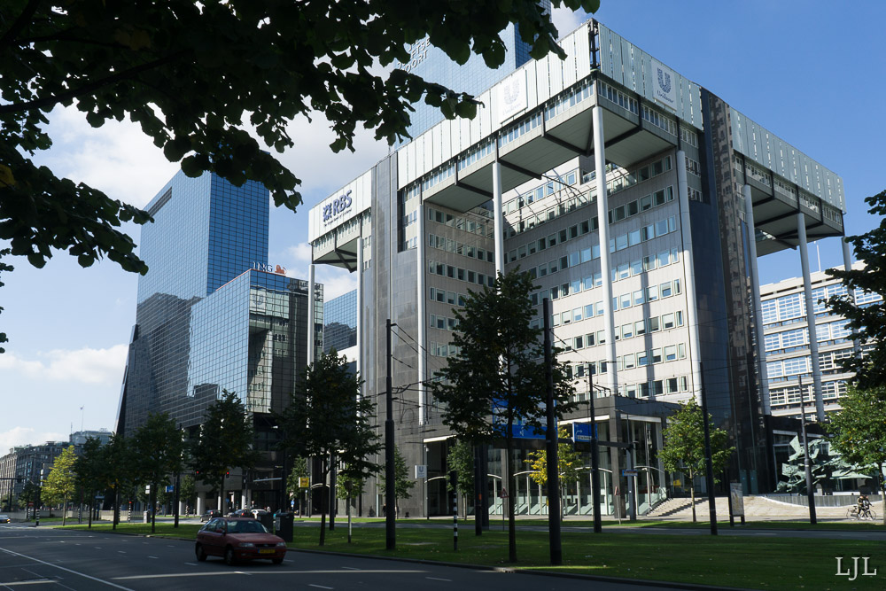 Weena, Rotterdam